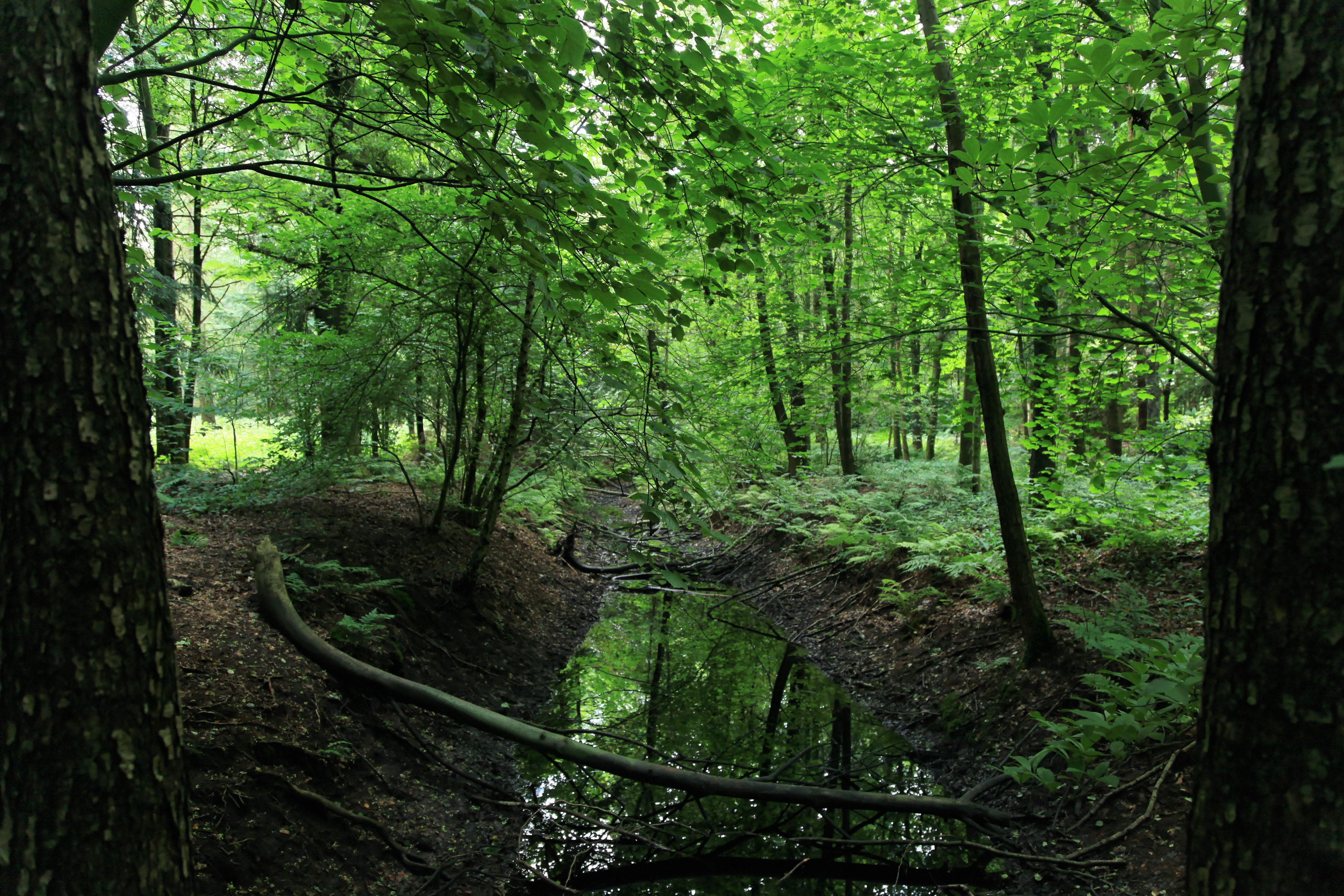 Heseler Wald in Hesel